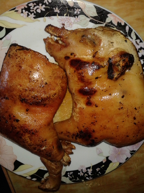 Hình tự chụp bằng điện thoại cá nhân